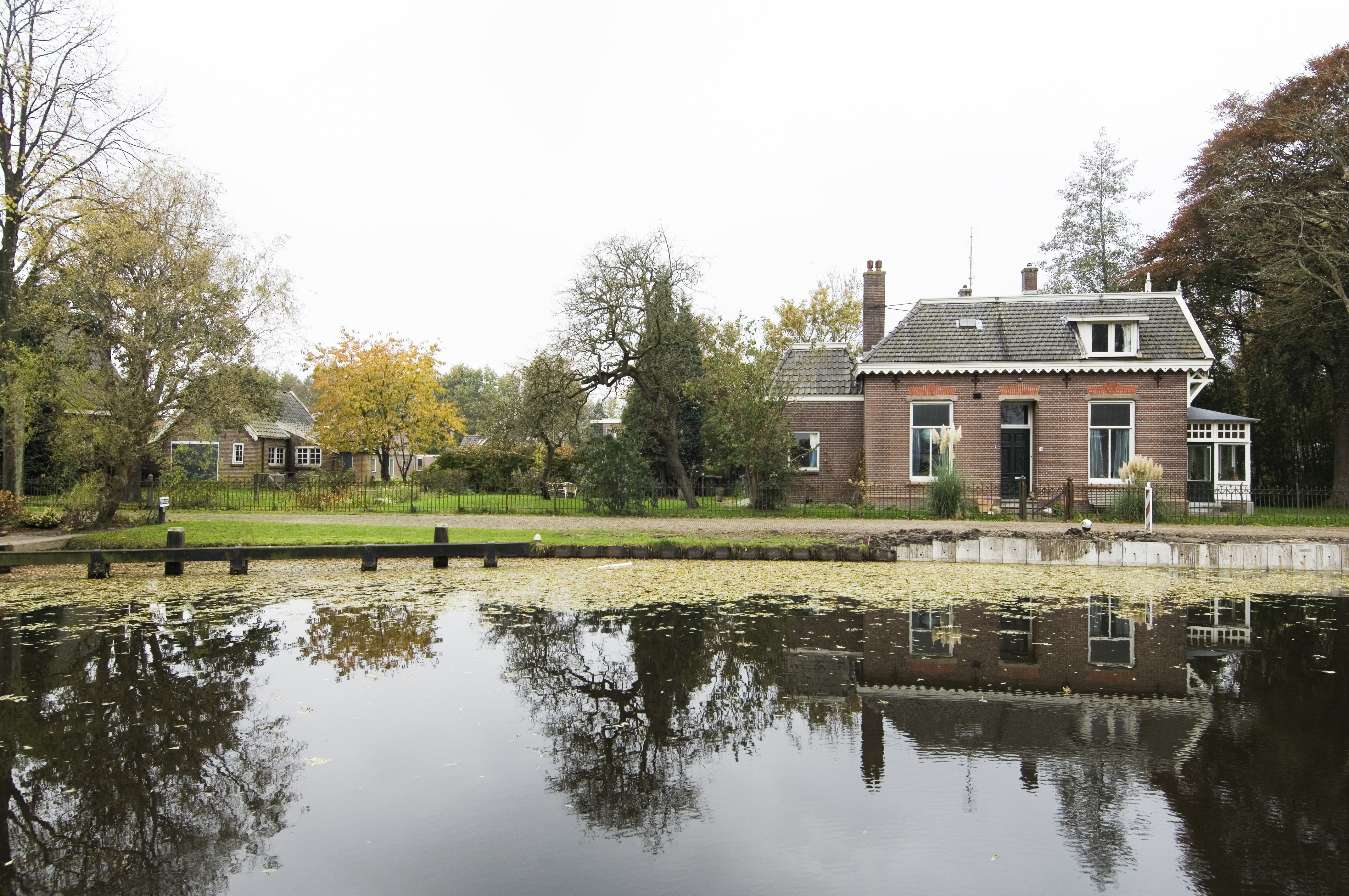 Opzichterswoning: Overzicht opzichterswoning, gezien vanaf de overzijde van het water